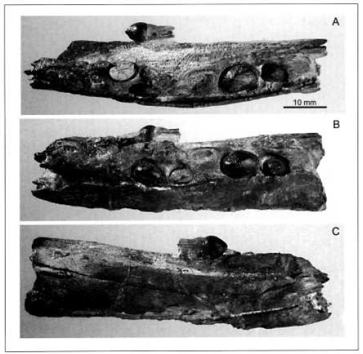 Tholodus schmidi right lower jaw ramus. A) dorsal, B) medial, C) lateral. Scale bar 10mm.